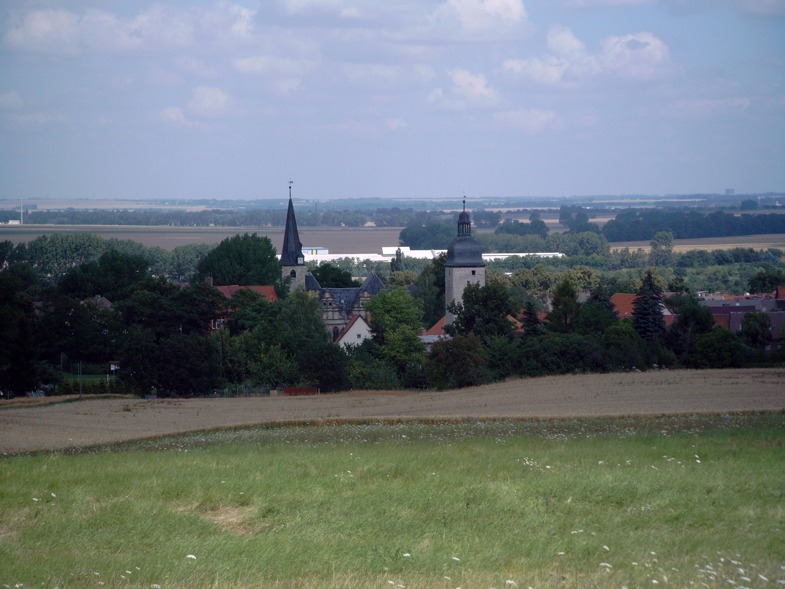 Kroppenstedt, von der Paulshöhe fotografiert